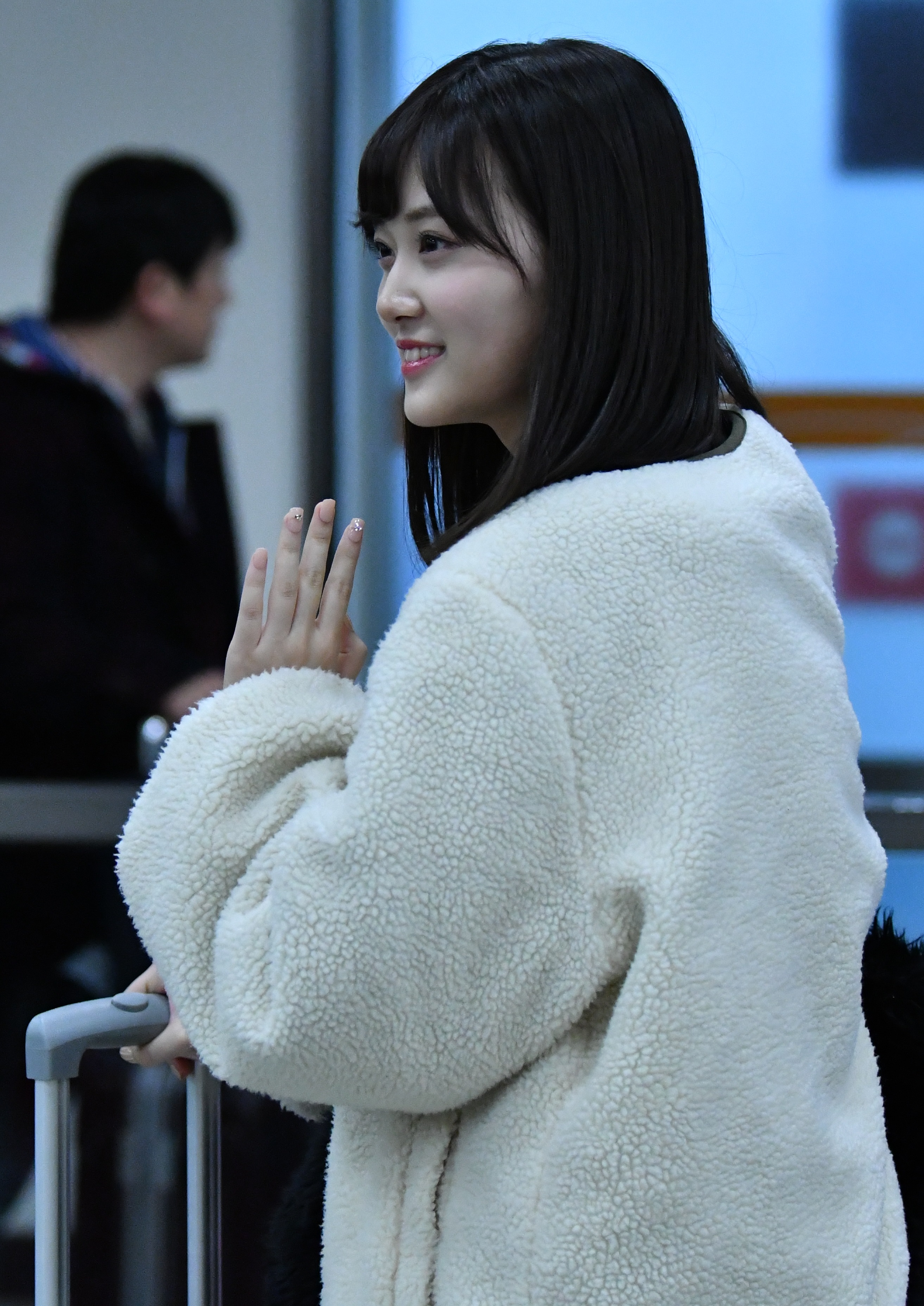 台北松山空港での山下美月